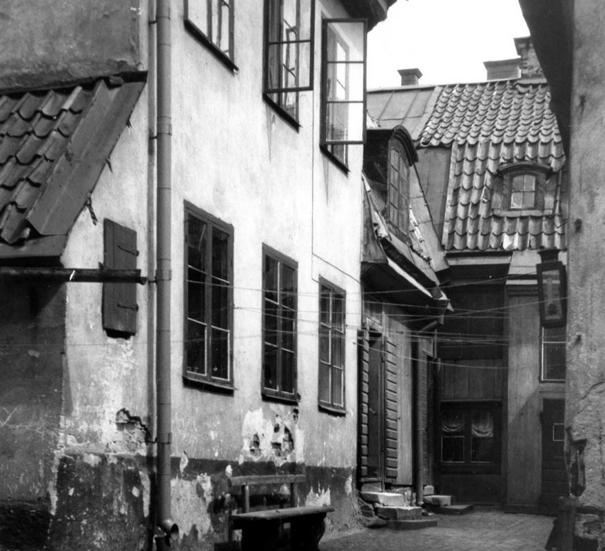 Bakgården fastigheten Sturen större 11